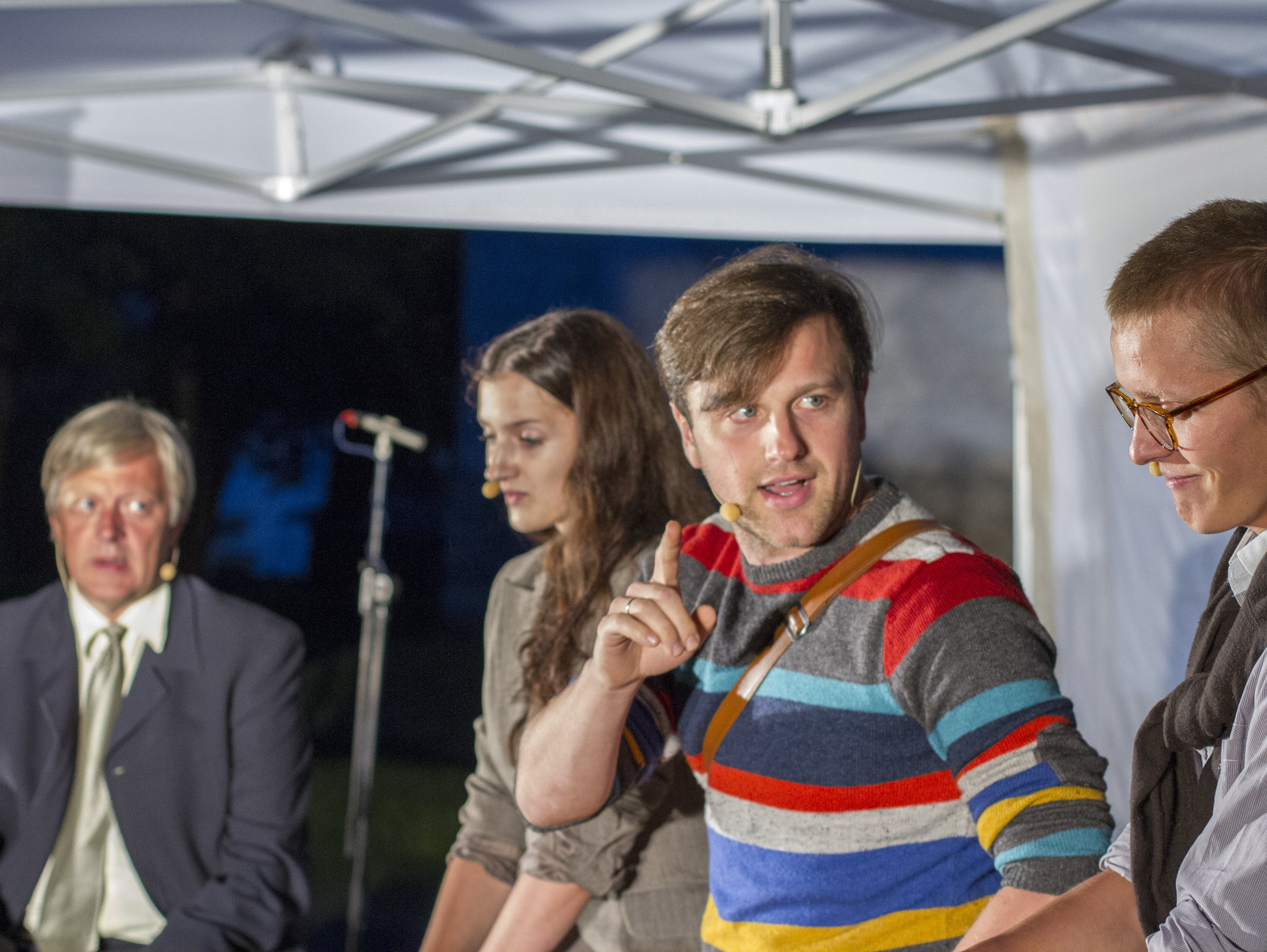 Arvamusfestival 2014